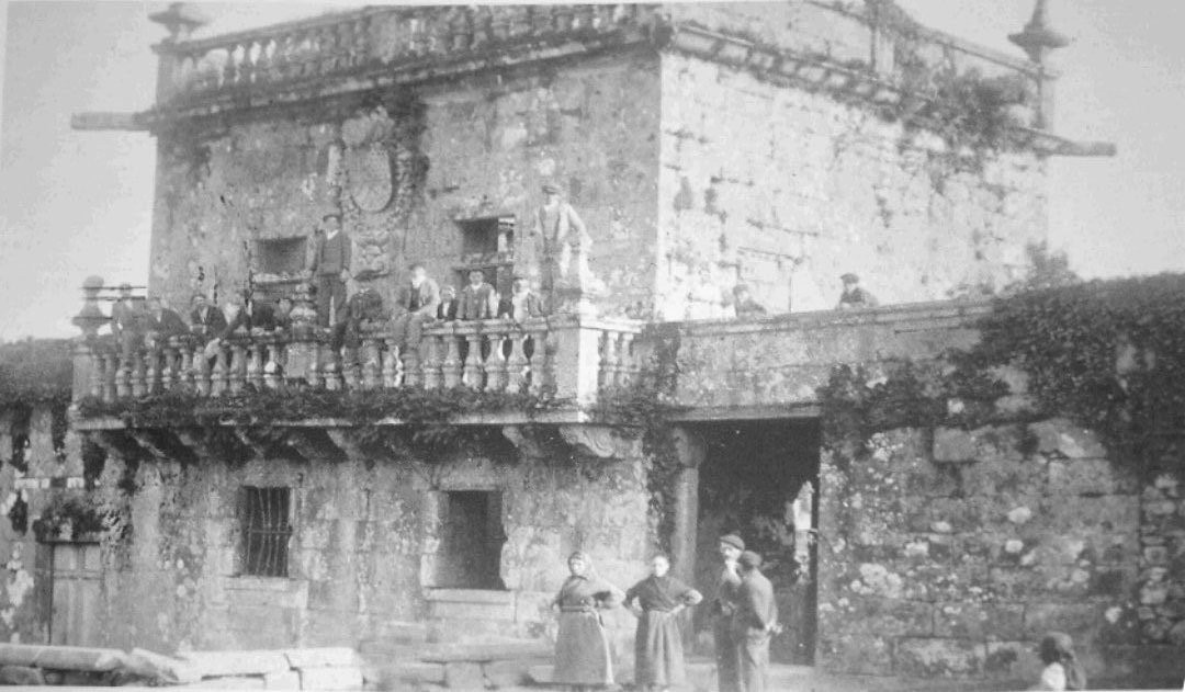 O pazo de Vigo (Dodro) arredor do ano 1920